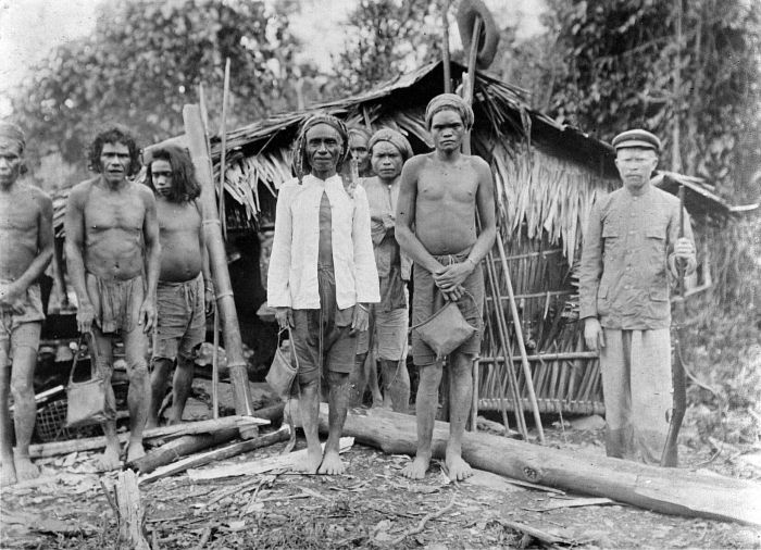 Repronegatief. Leden van een stam uit het gebied ten zuidoosten van het meer Rana in het binnenland van Boeroe